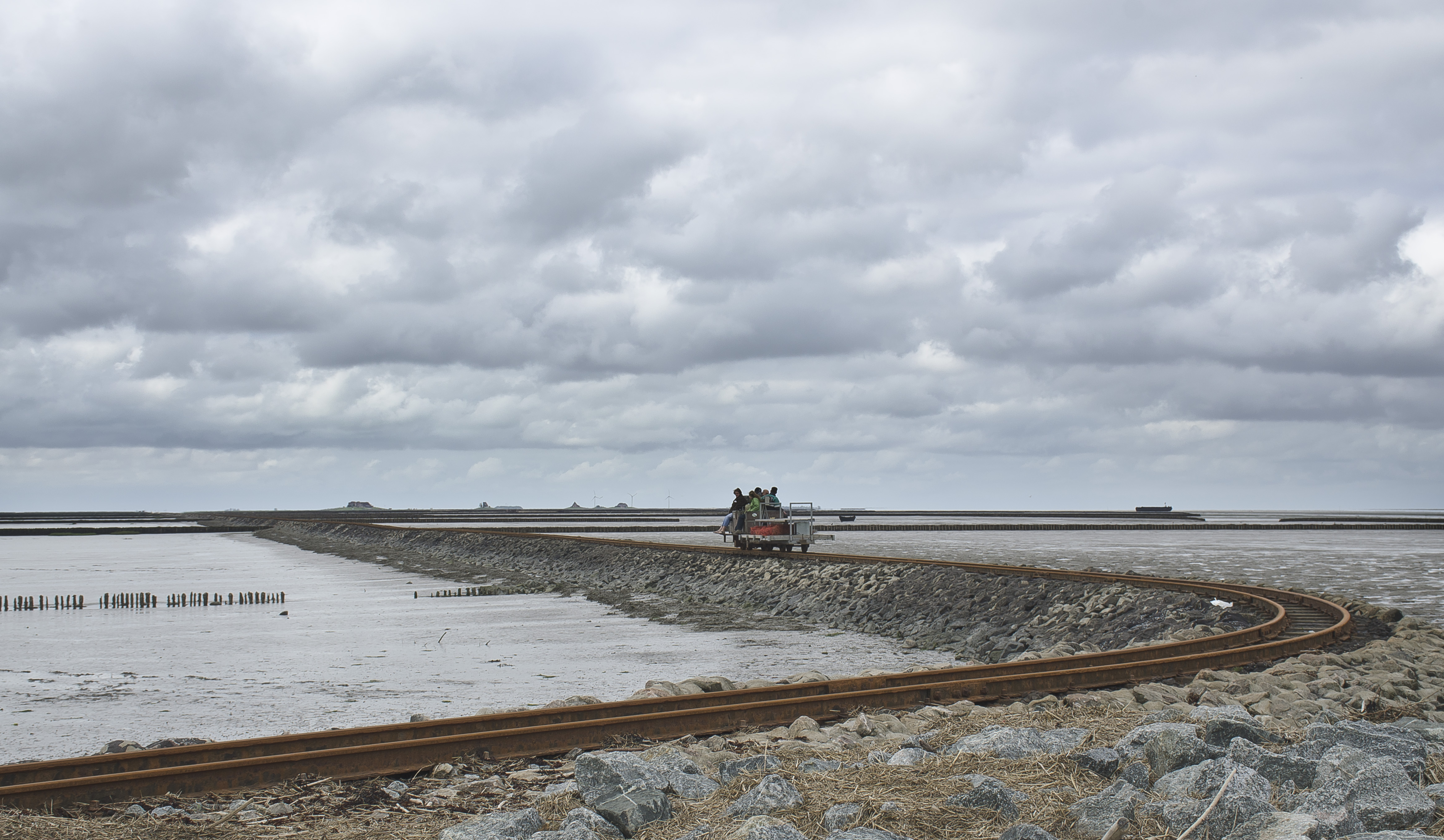 Hallig Nordstrandischmoor, Lorenbahn